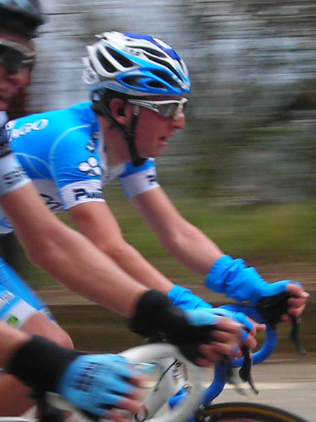 Sacha Modolo sulle Manie alla Milano - Sanremo 2011